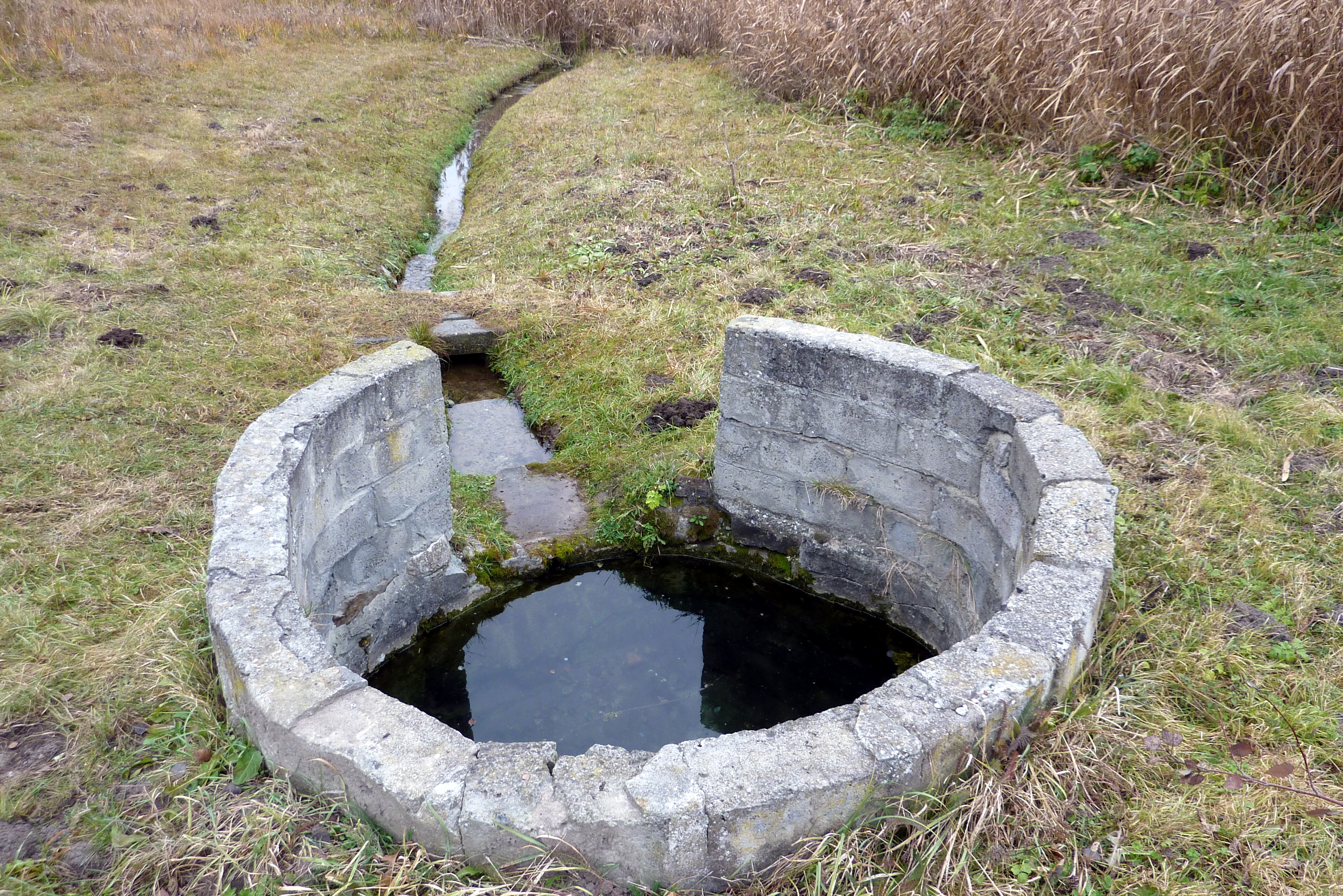 Źródełko i strumyk na kieleckim Zagórzu